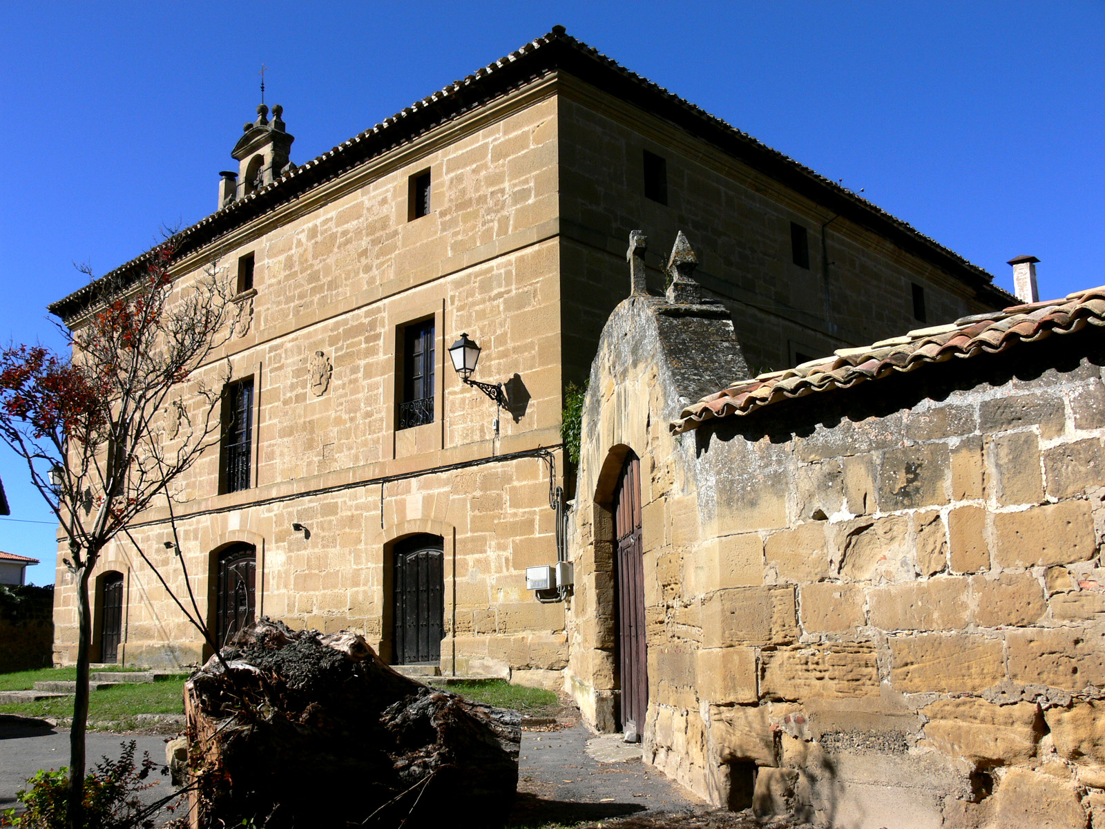 Casa del Priorato en Cihuri, La Rioja, España.